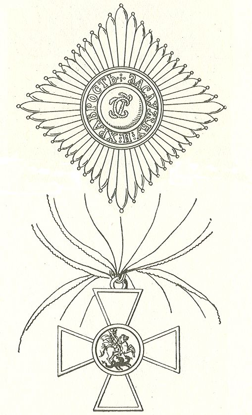 Scan van Blz. 425 en 426 van het boek "Handbuch der Ritter- und Verdienstorden " uitgegeven 1893 door Weber.Tekening van de in 1902 overleden Maximilian Gritzner. Robert Prummel 10 jul 2008 16:40 (CEST)